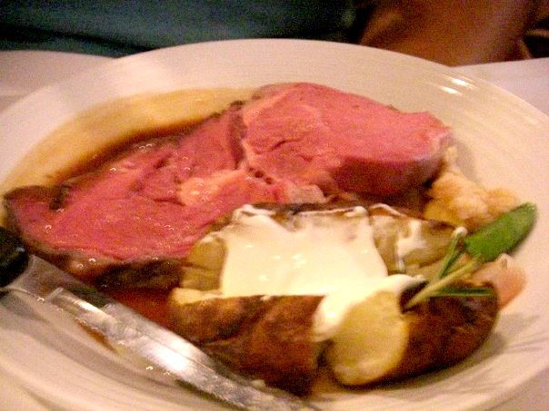 Bahamas 2007